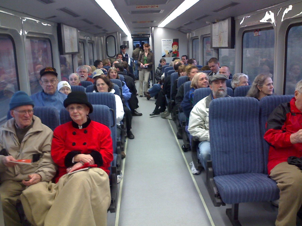 0123091541a